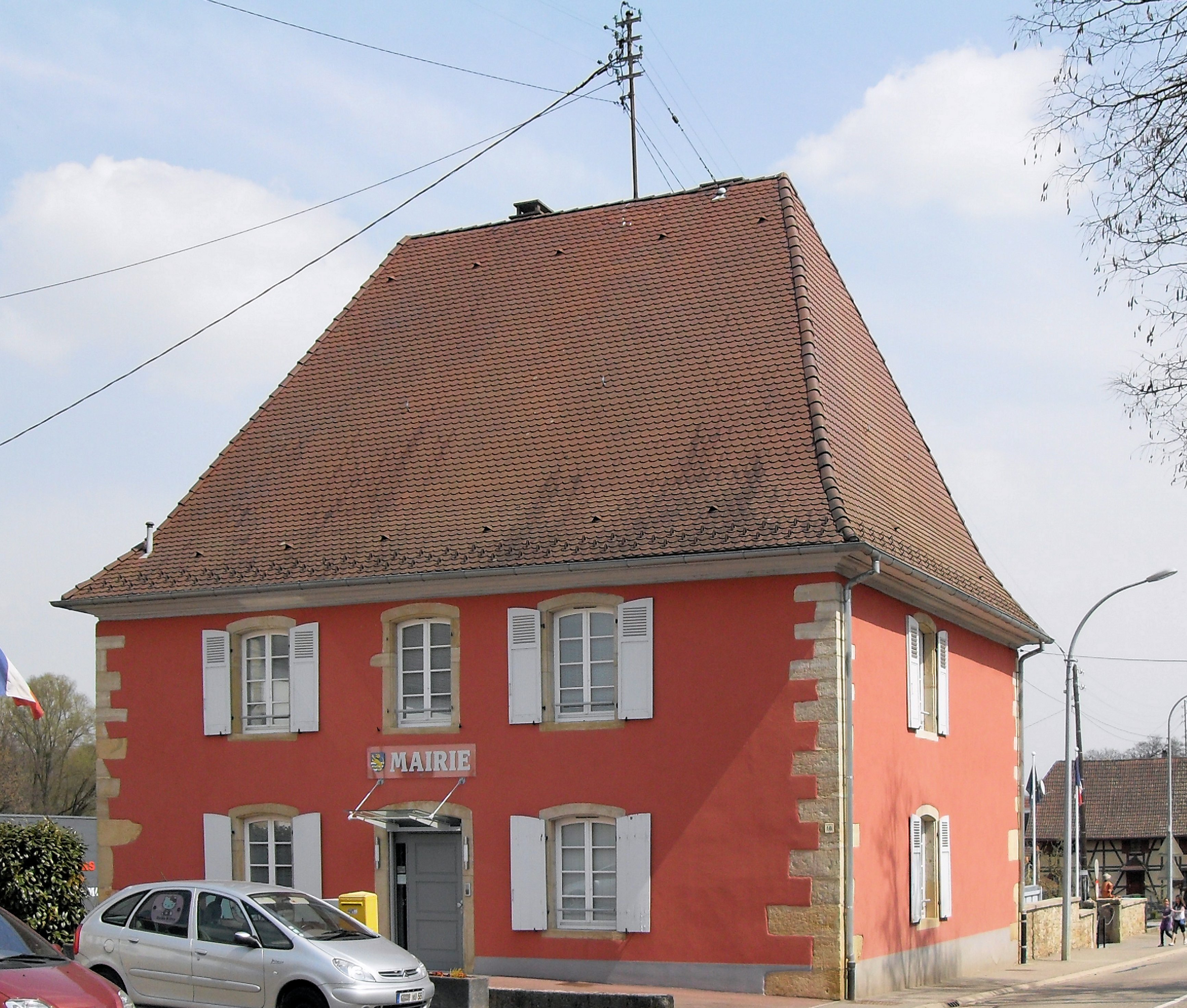 La mairie de Hundsbach